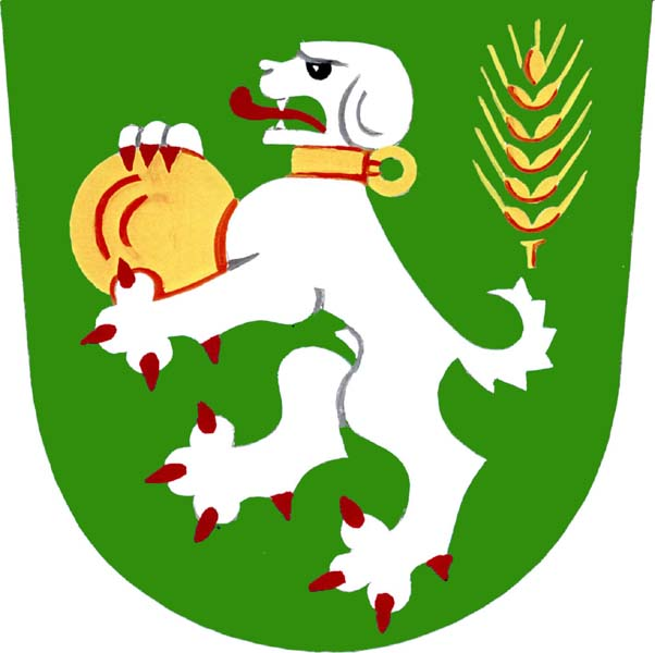 Znak obec Slopné